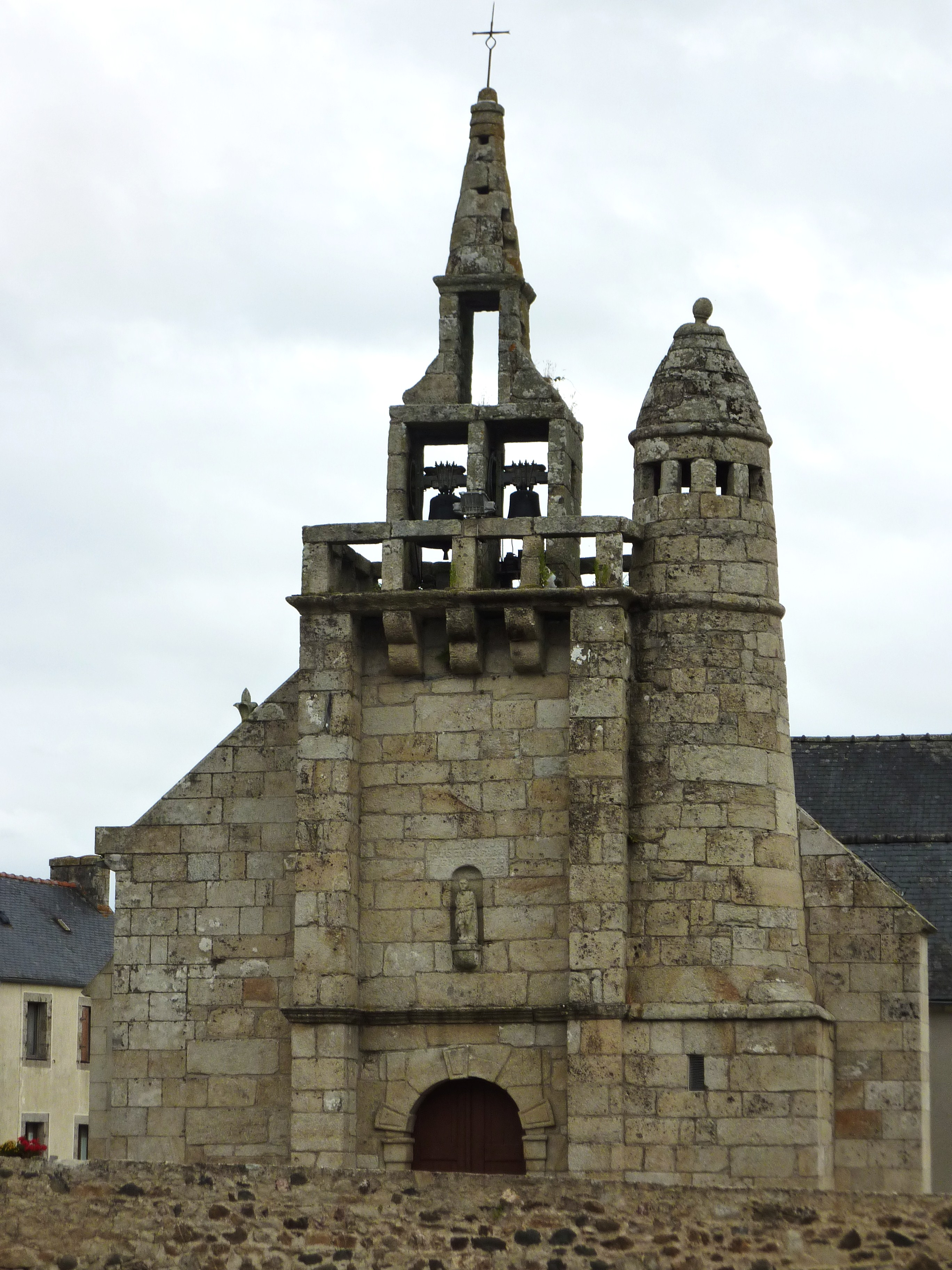 Bolazec: l'église paroissiale